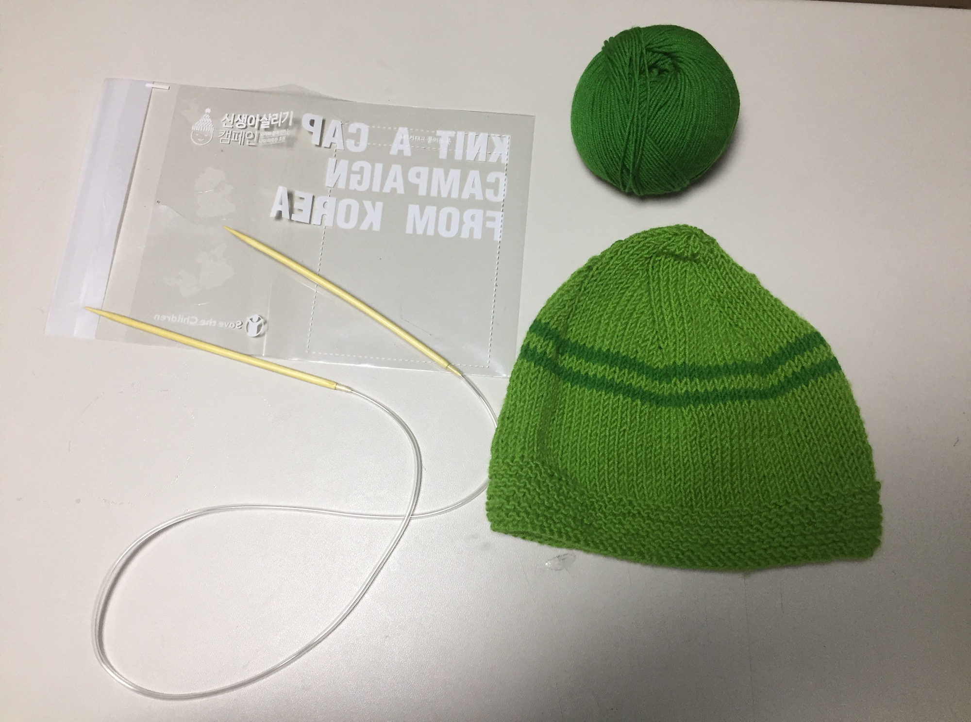 세이브 더 칠드런의 신생아살리기 캠페인 모자 뜨기 키트와 , 모자가 완성된 모습